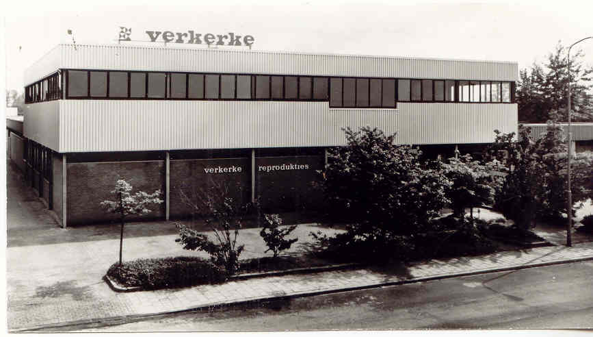 Bedrijfspand Verkerke Reproducties